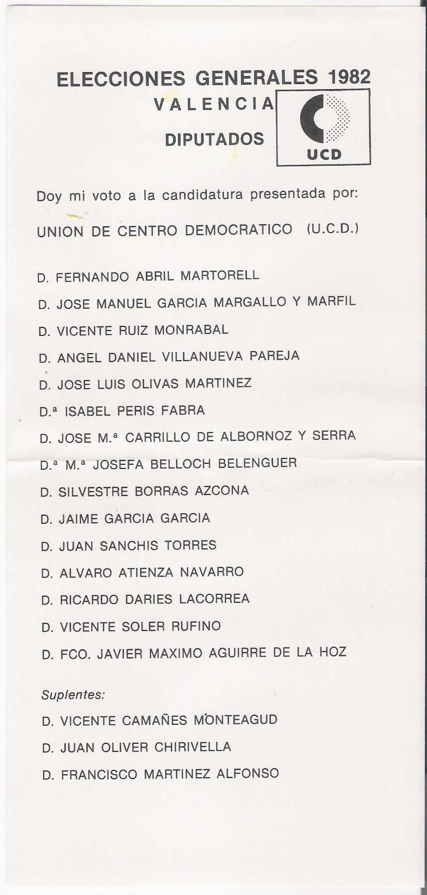 Papeleta de la Unión de Centro Democrático al Congreso por Valencia en 1982.